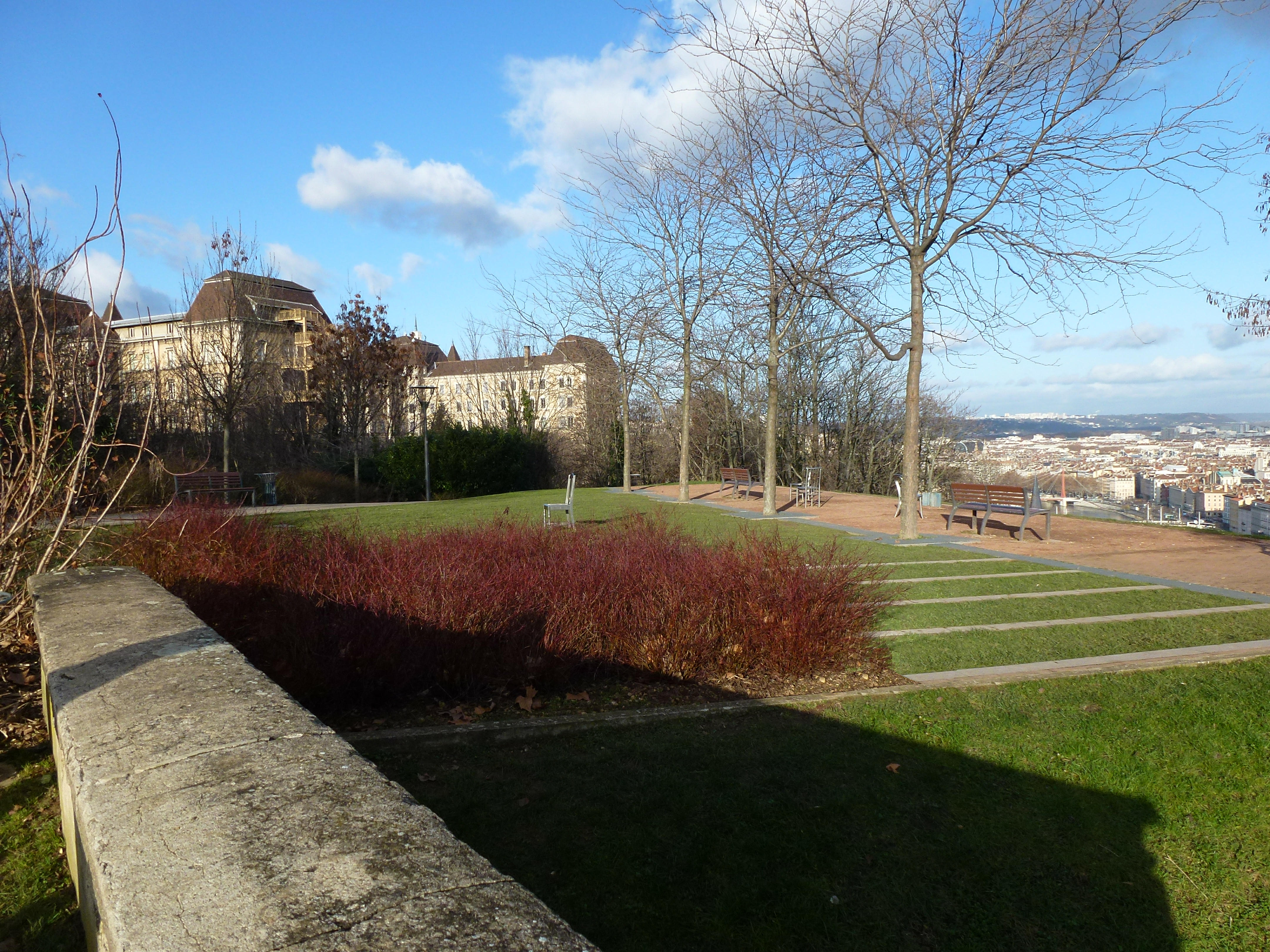 Le jardin des Curiosités à Lyon (5ème) - Vue générale